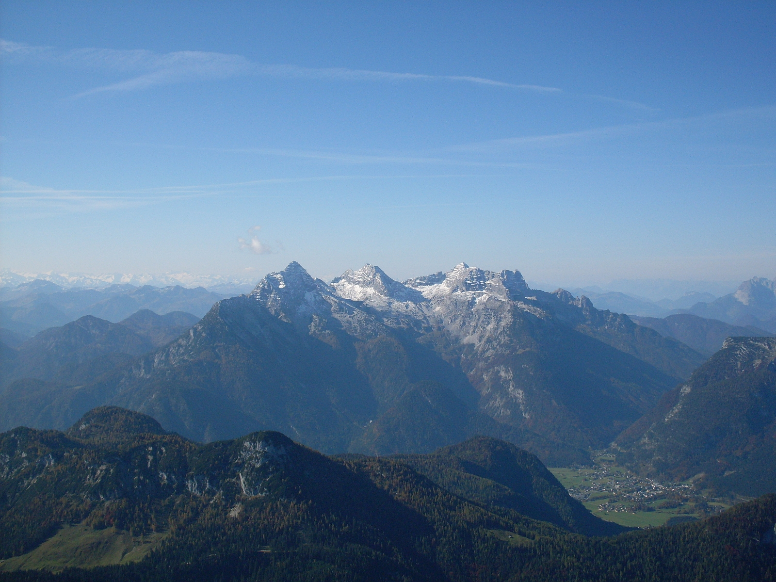 Blick vom Großen Häuselhorn (2284m) auf die Loferer Steinberge im Südwesten